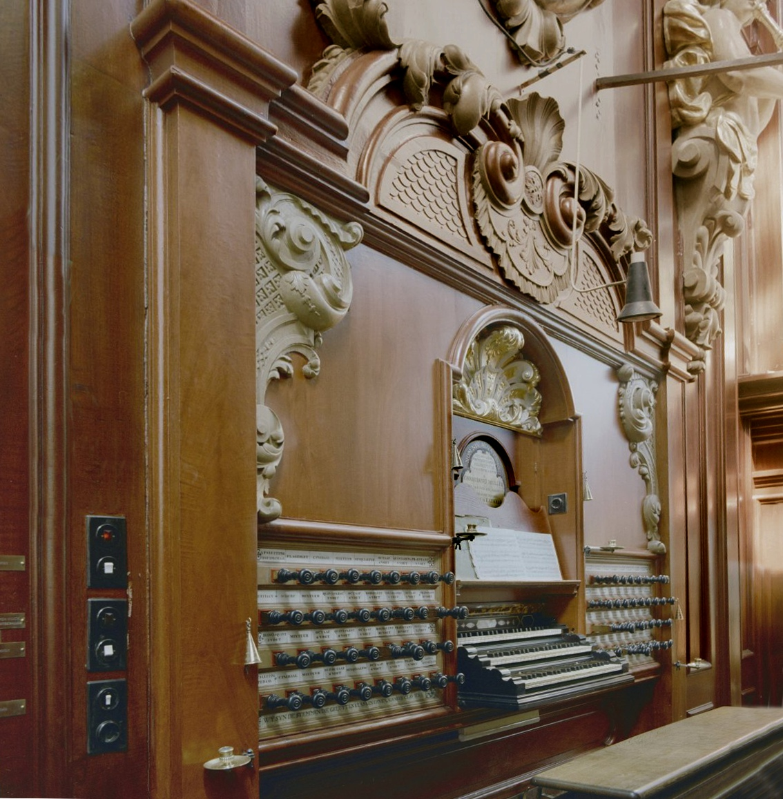 NEDERLANDS HERVORMDE KERK (GROTE OF SINT-BAVOKERK): INTERIEUR, KLAVIATUUR VAN HET ORGEL